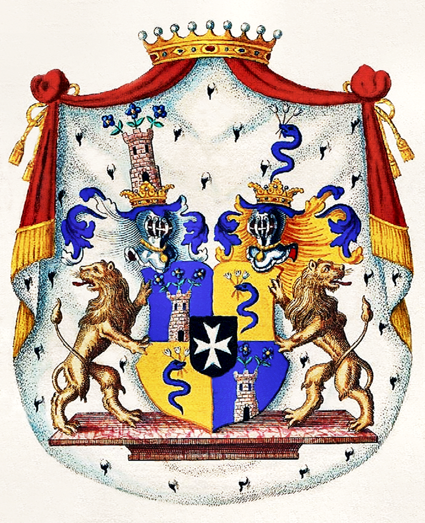 Wappen der Grafen von Lynar nach Tyroff, Bd. 4, T. 67